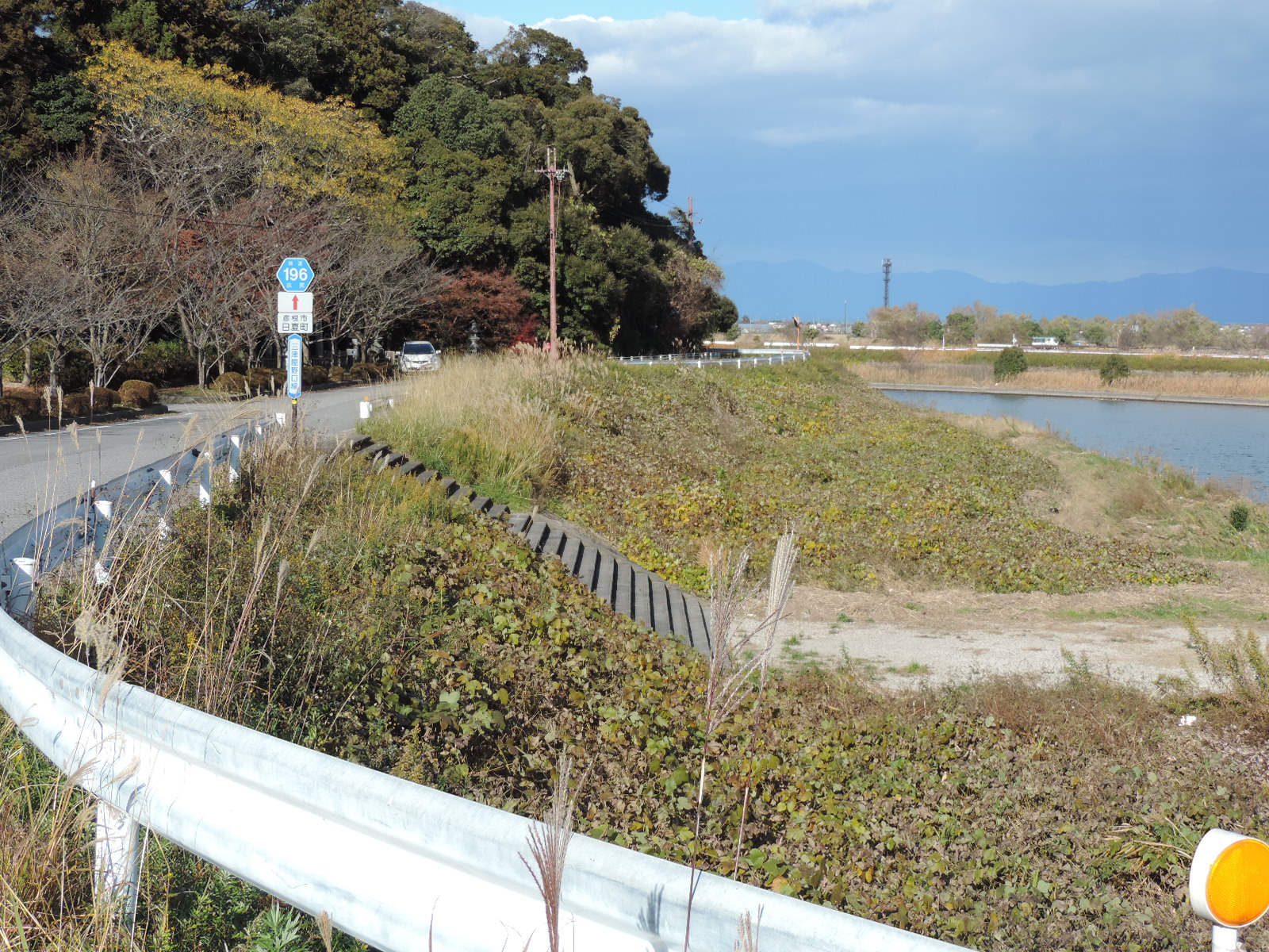 滋賀県道196号三津屋野口線、彦根市日夏町にて（2017年撮影）